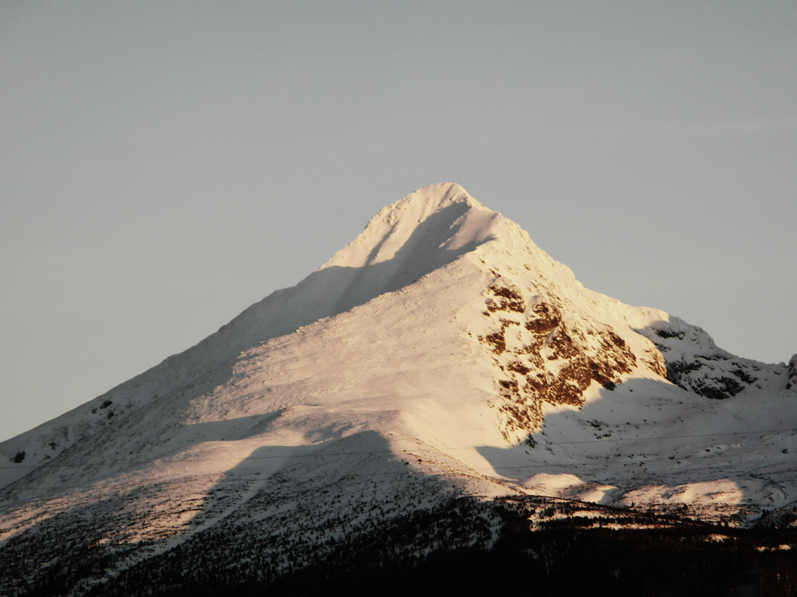 Krivan